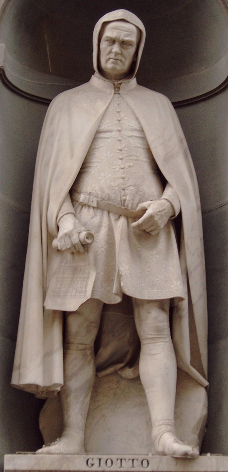 Firenze, Loggiato degli Uffizi, Statue degli „Illustri Toscani“, Statua di Giotto di Bondone di Giovanni Dupré.